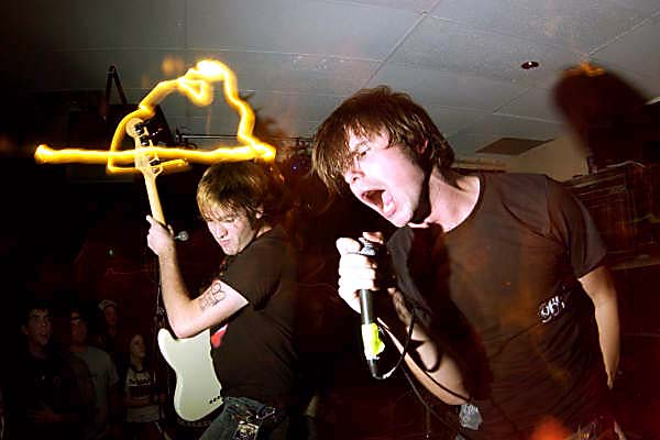 Silverstein, Эмр группа